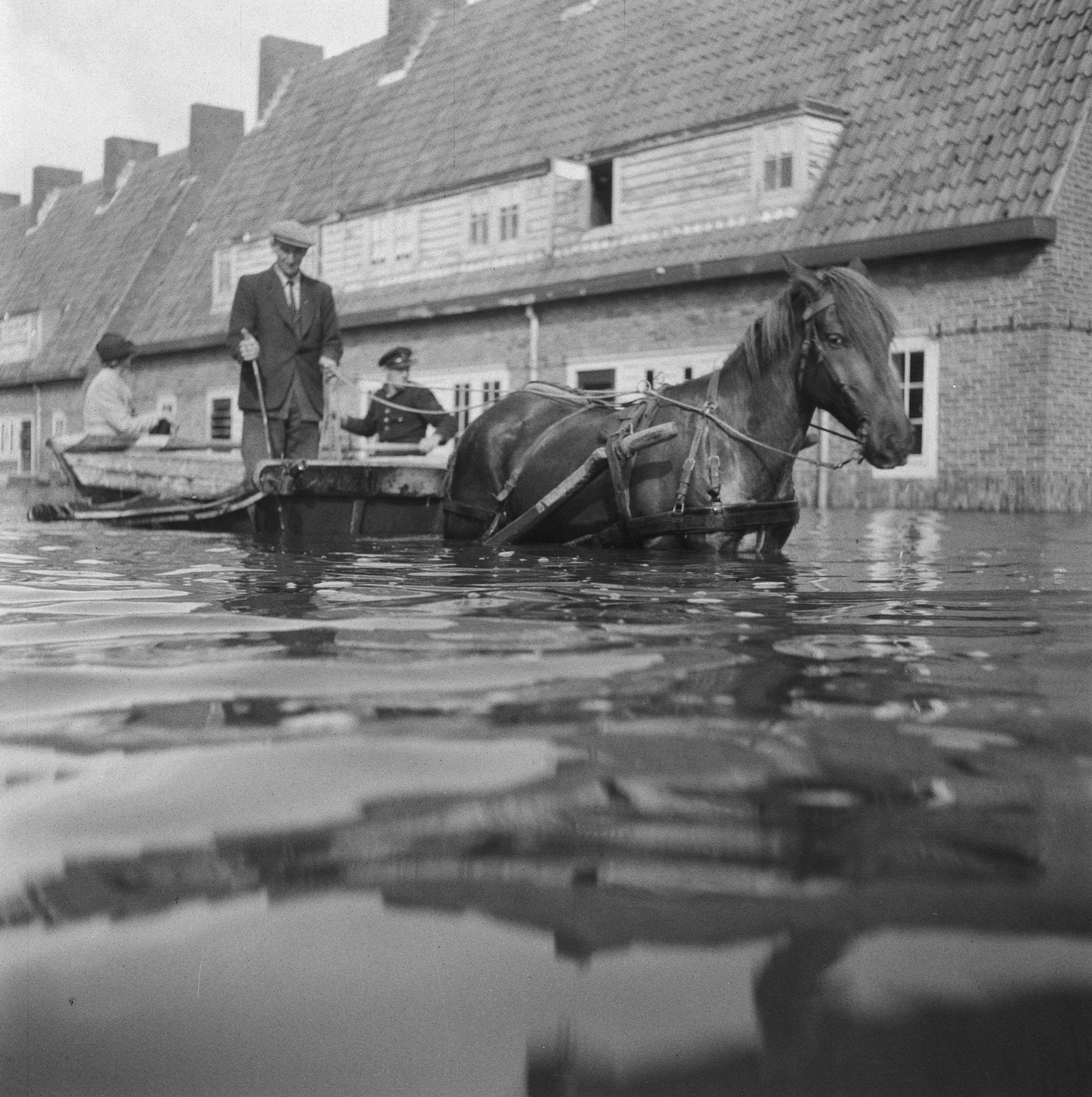 Collectie / Archief : Fotocollectie Anefo Reportage / Serie : Walcheren: Herstelling Nollegat in de zeedijk en andere plaatsen in Walcheren Beschrijving : Paard en wagen in ondergelopen straat Datum : oktober 1945 Locatie : Walcheren Trefwoorden : herstel, tweede wereldoorlog, wederopbouw Fotograaf : Blazer, Carel / Anefo Auteursrechthebbende : Nationaal Archief Materiaalsoort : Negatief (zwart/wit) Nummer archiefinventaris : bekijk toegang 2.24.01.03 Bestanddeelnummer : 900-7614